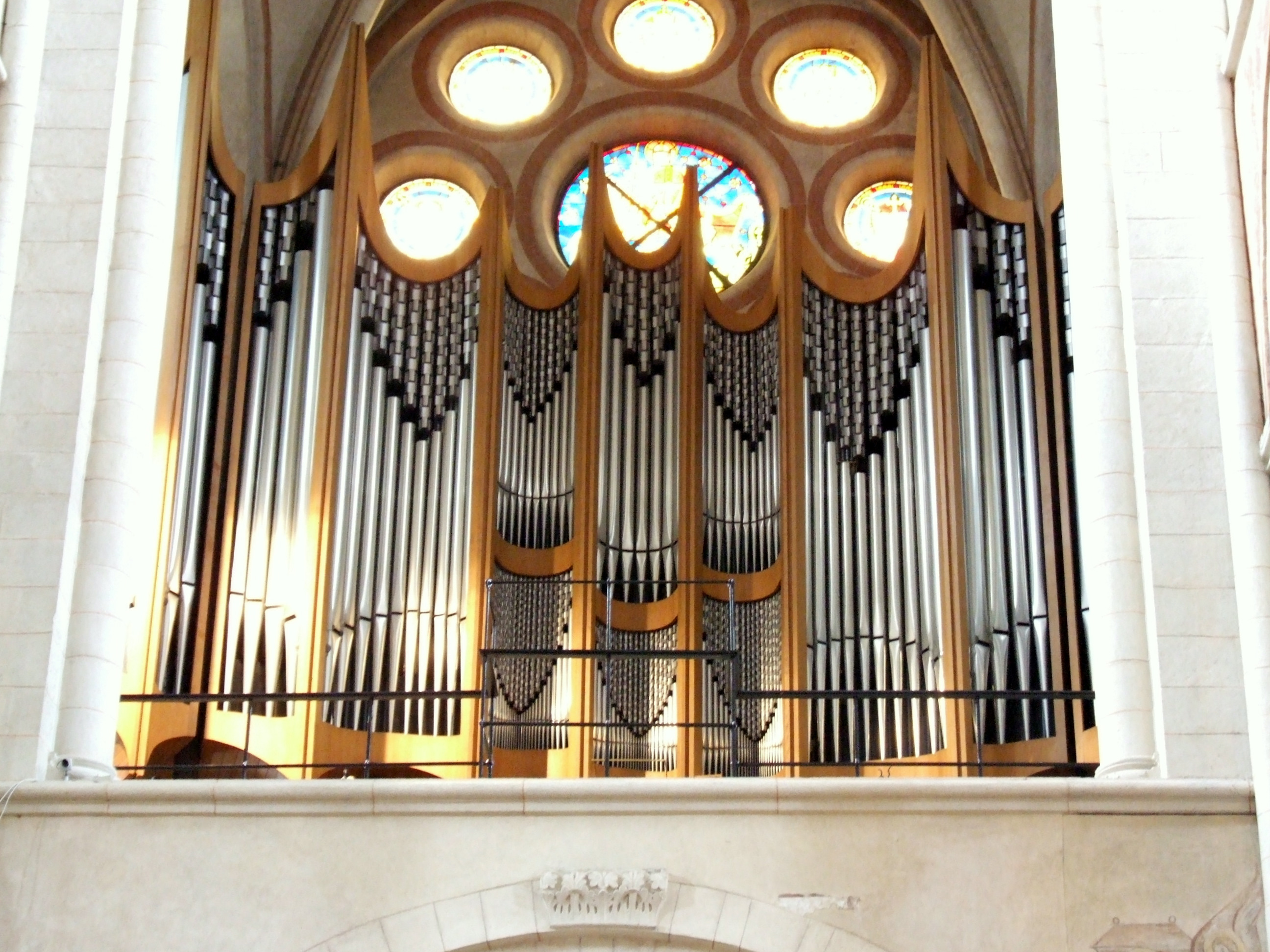 Orgel im Limburger Dom